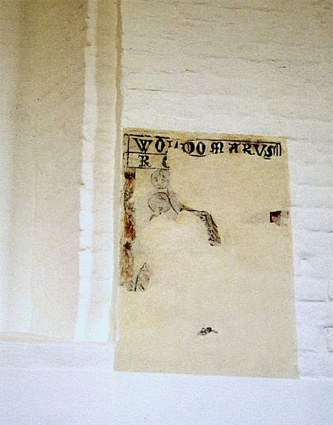 Valdemar Atterdags våben på skibets nordvæg da: Tvilum Kirke